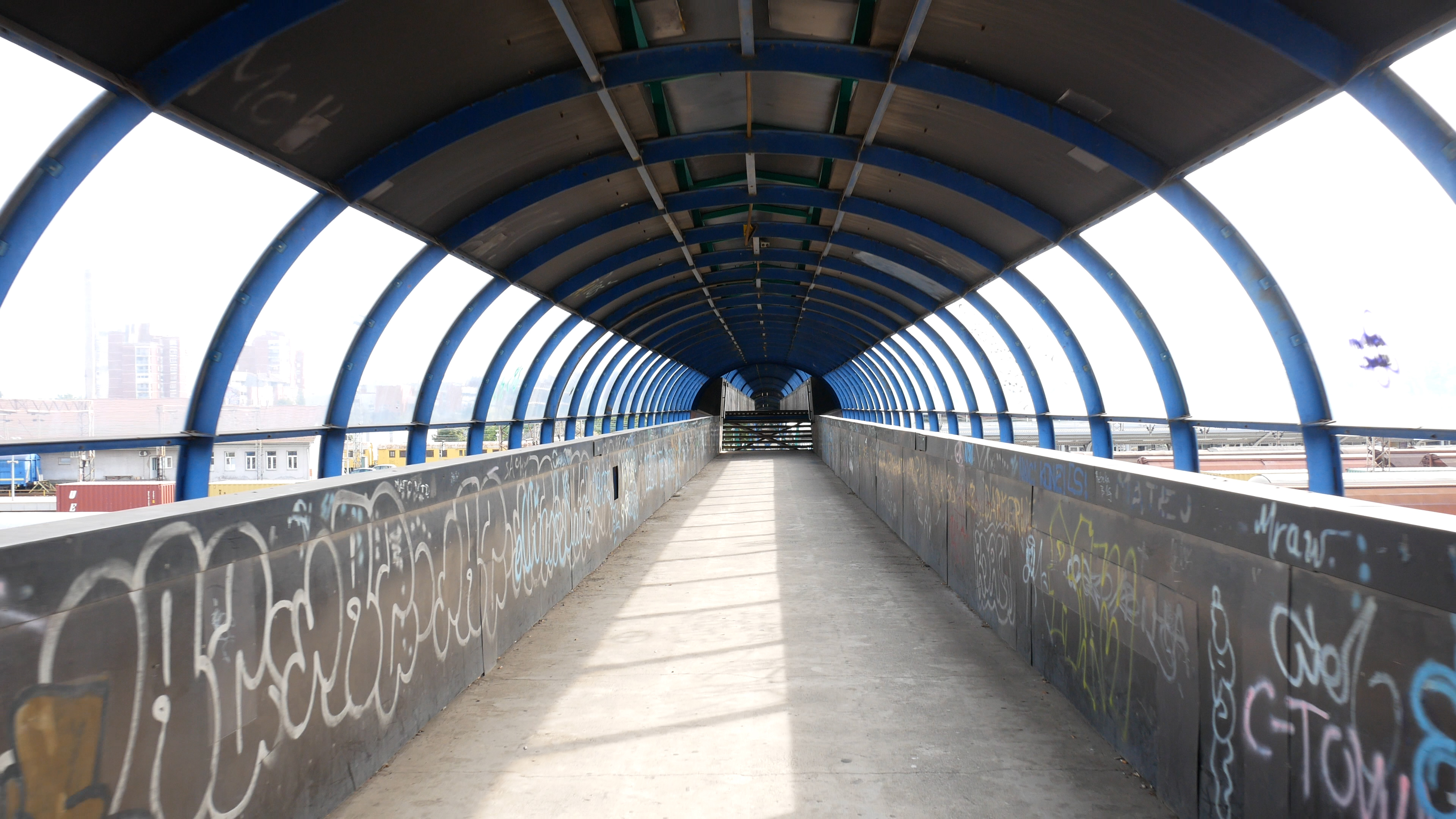 Unutrašnjost Đurinog mosta